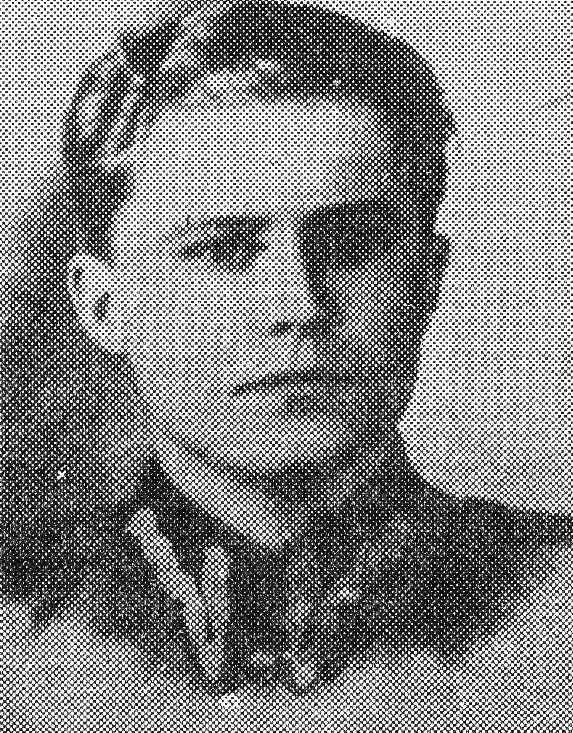 Edward Gronczewski - Przepiórka (AL).